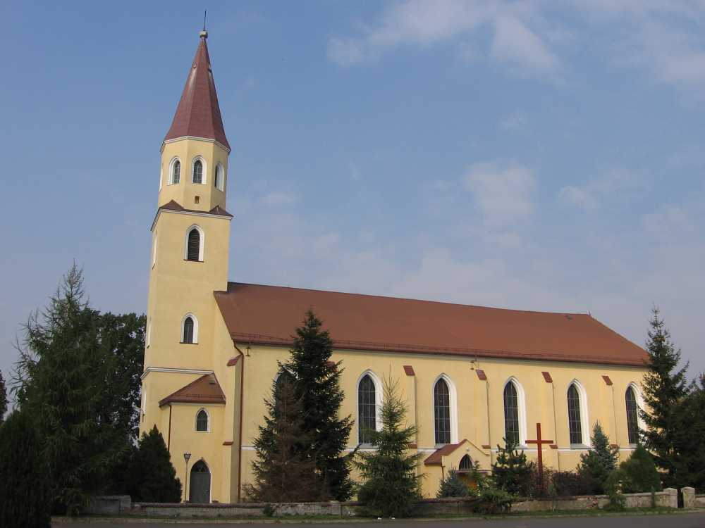 Grzędzin - neogotycki kościół parafialny pw. św. Piotra i Pawła, 1874.